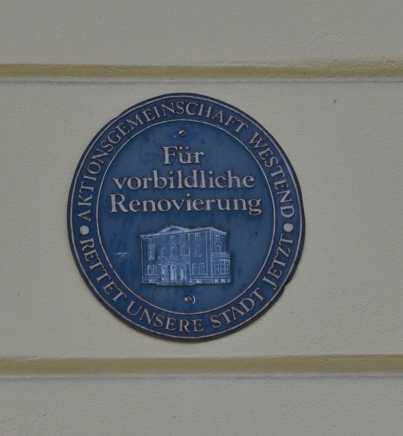 Tafel am Haus Eschersheimer Landstraße 103. Die Aktionsgemeinschaft Westend zeichnet die vorbildliche Renovierung dieses denkmalgeschützten Hauses aus.